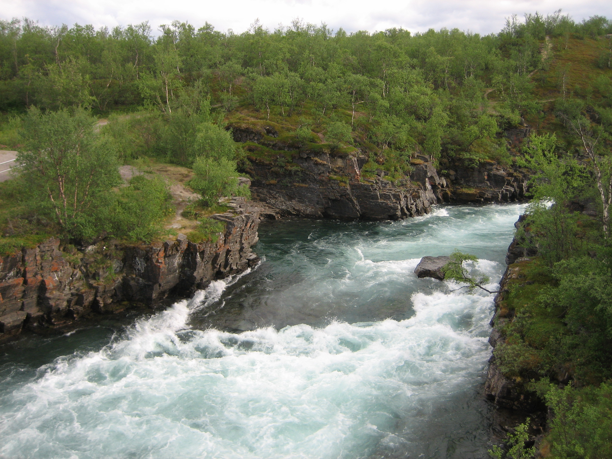 Canyon of Abiskojåkka river, Abisko nationalpark